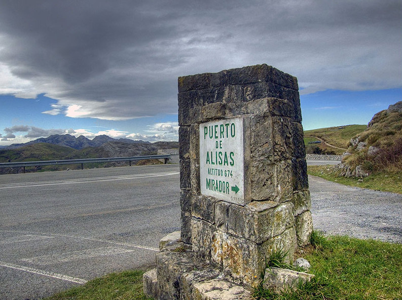 Monolito en el Puerto de Alisas